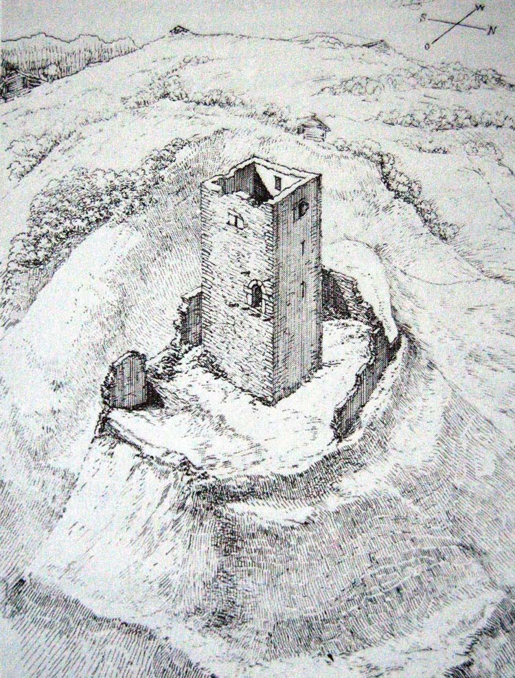 Zeichnung 1894